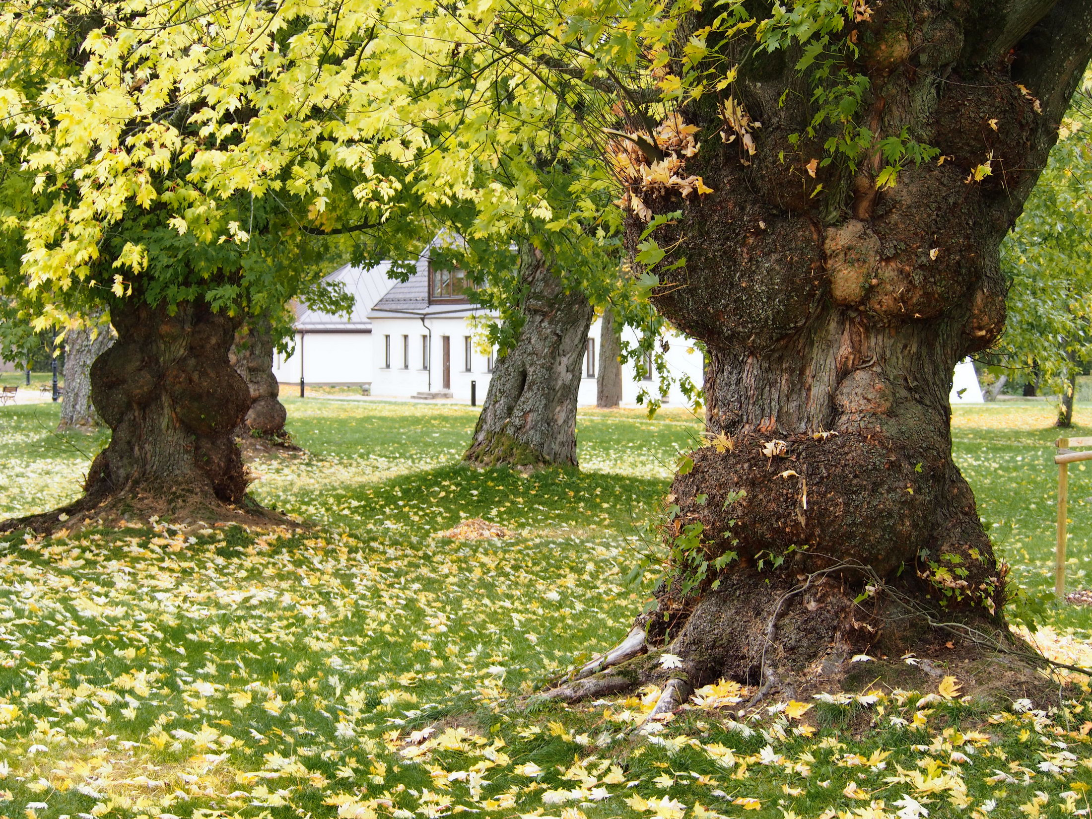 Gelgaudiškio dvaro sodybos sidabrinių klevų alėja